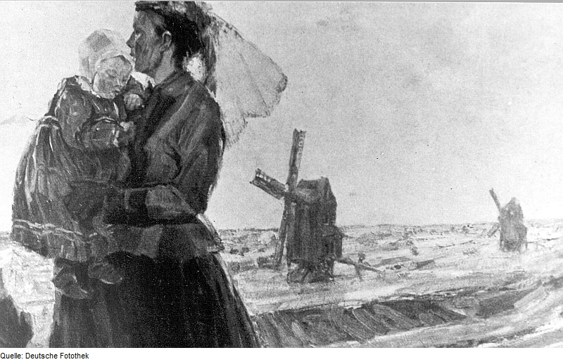 Original image description from the Deutsche Fotothek Windmühlen, Ausschnitt aus: Gemälde von H. Nadler/Gröden, aus: Heimatkalender Bad Liebenwerda, 1914